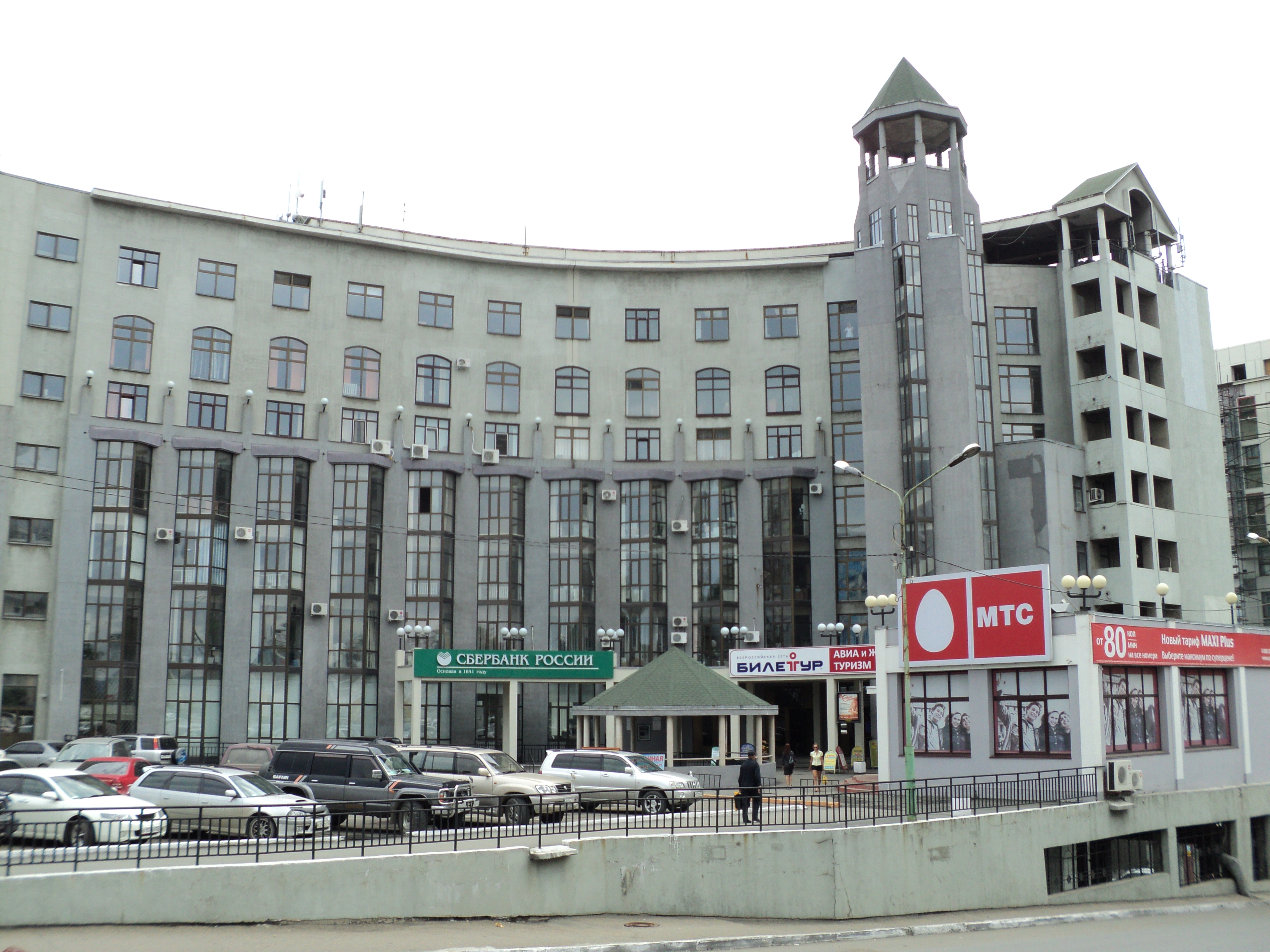 Деловой центр. View of the building from the central square